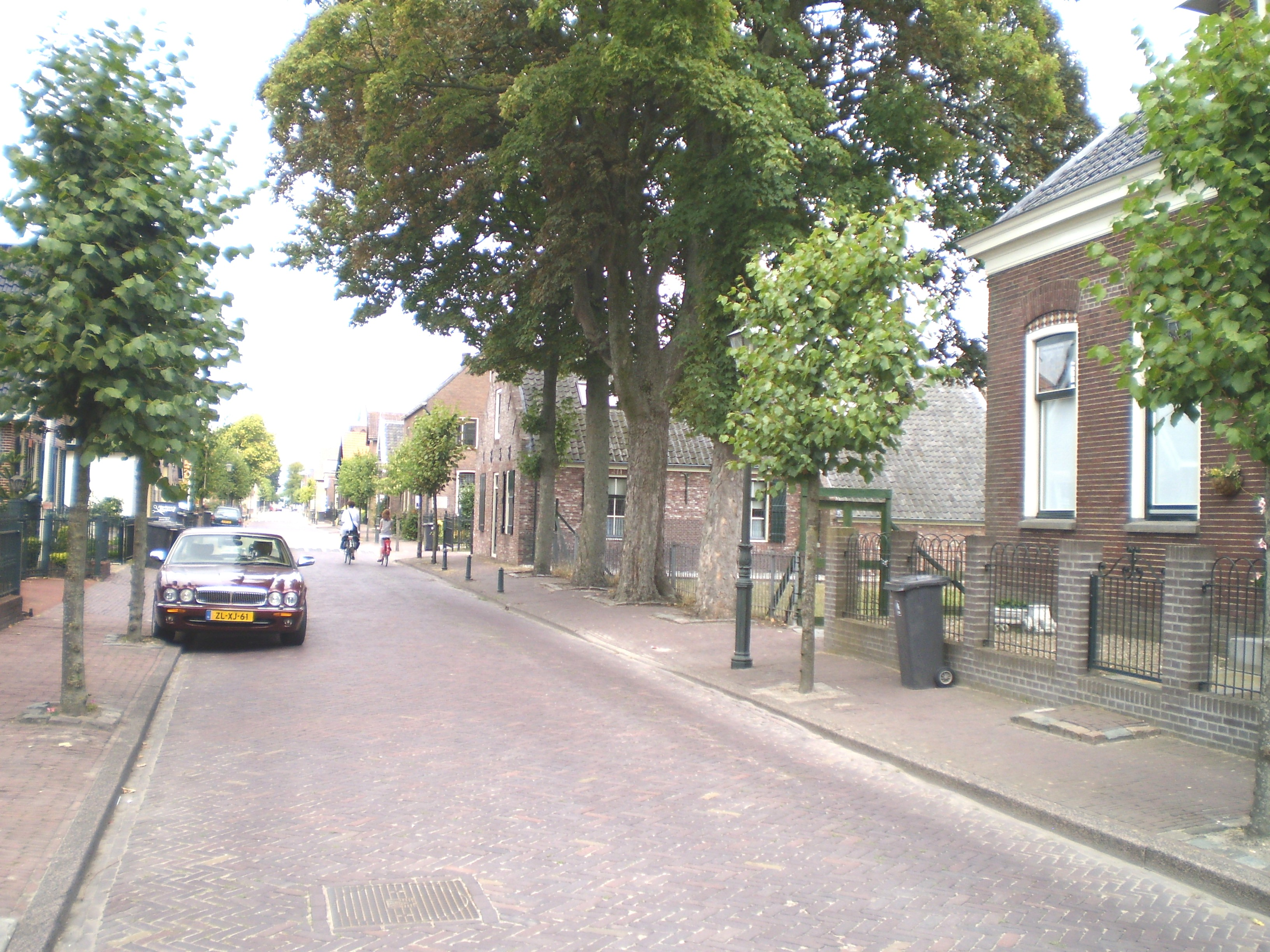 Buorren Bunschoten